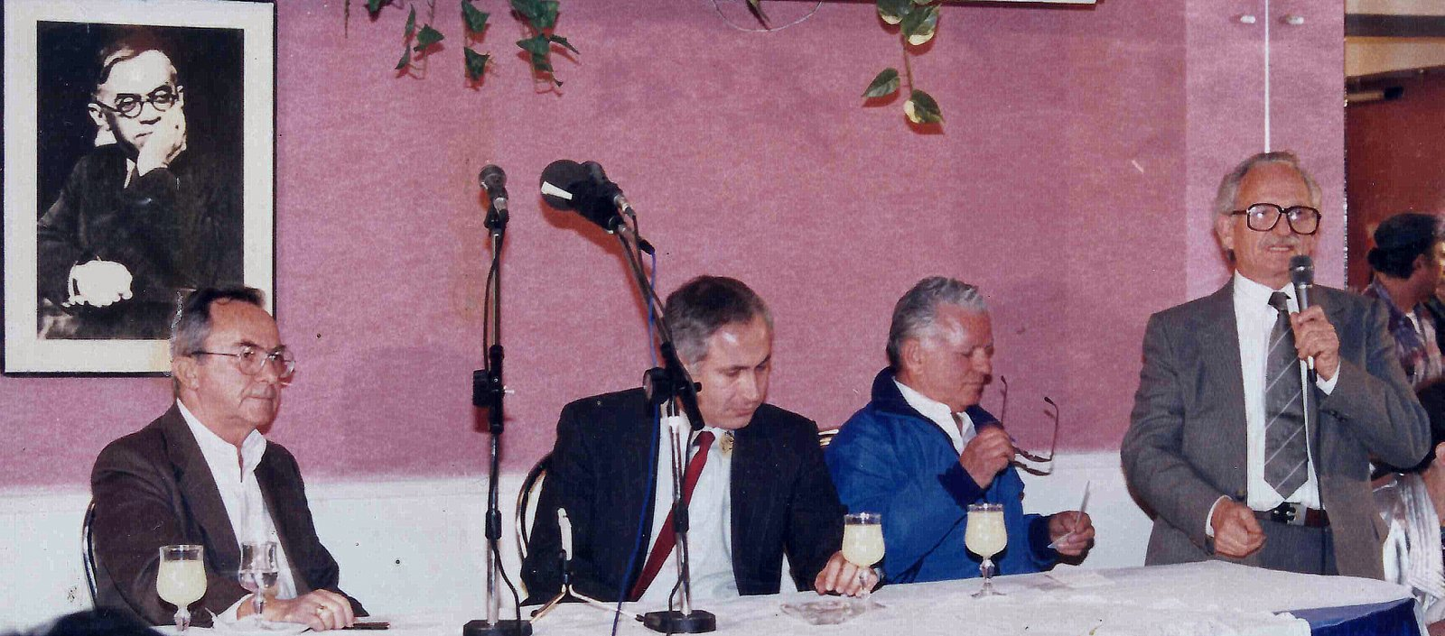 בני שמר בבית ז'בוטינסקי